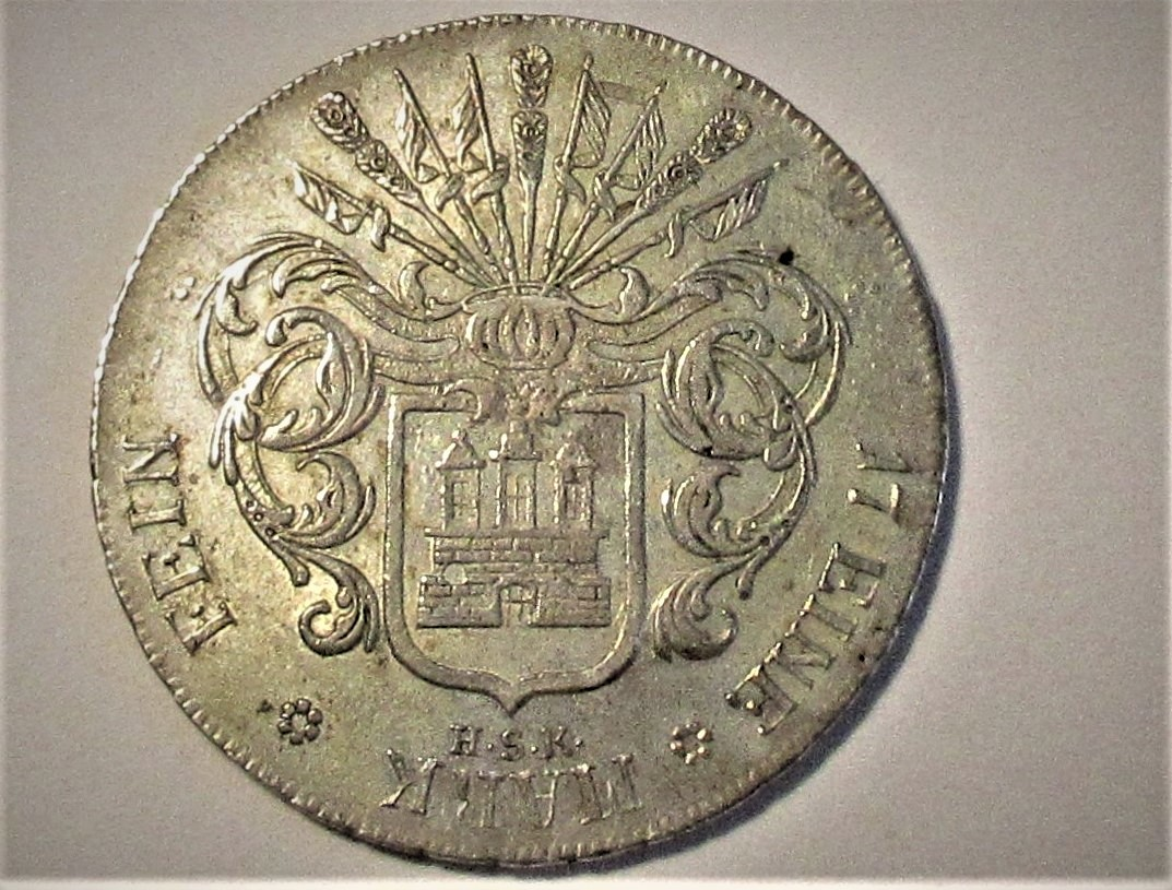 Hamburger 32 Schillinge, Jahr 1808, Wappenseite, AKS 12